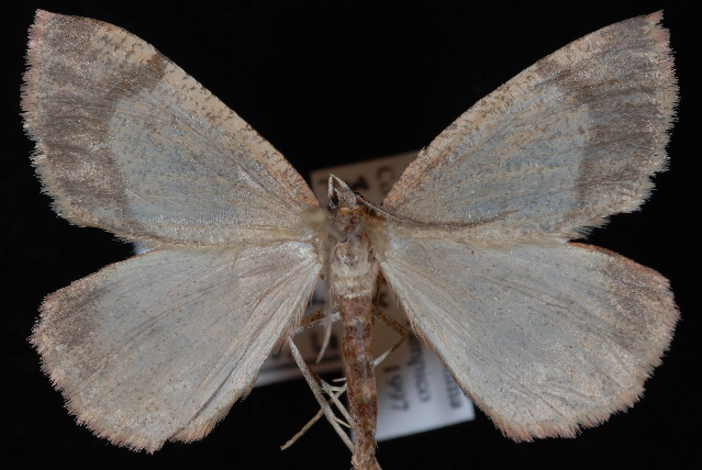 Sericosema juturnaria